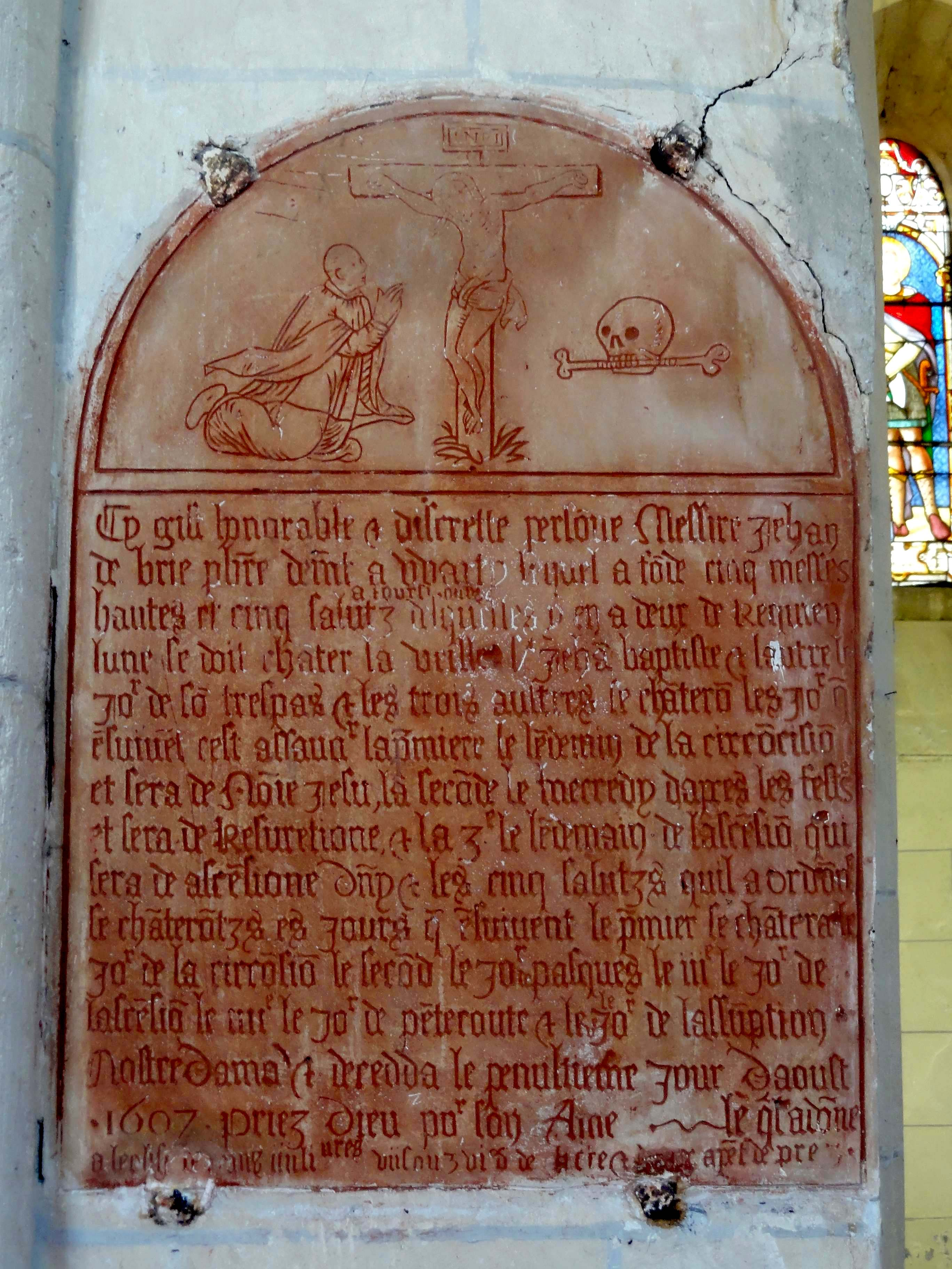 Plaque de fondation de Jehan de Brie.